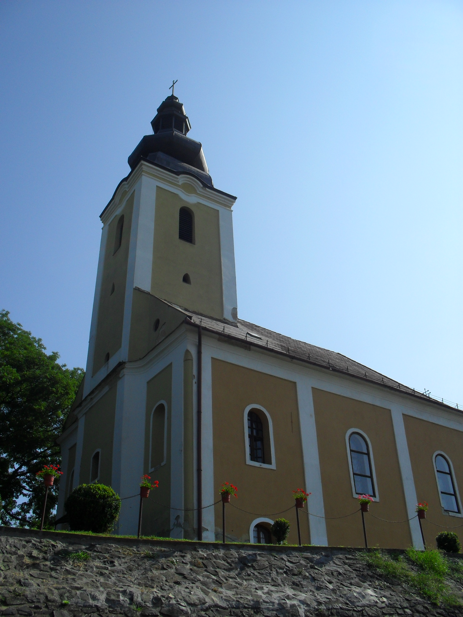 Karancskeszi - Szent Mihály főangyal római katolikus templom